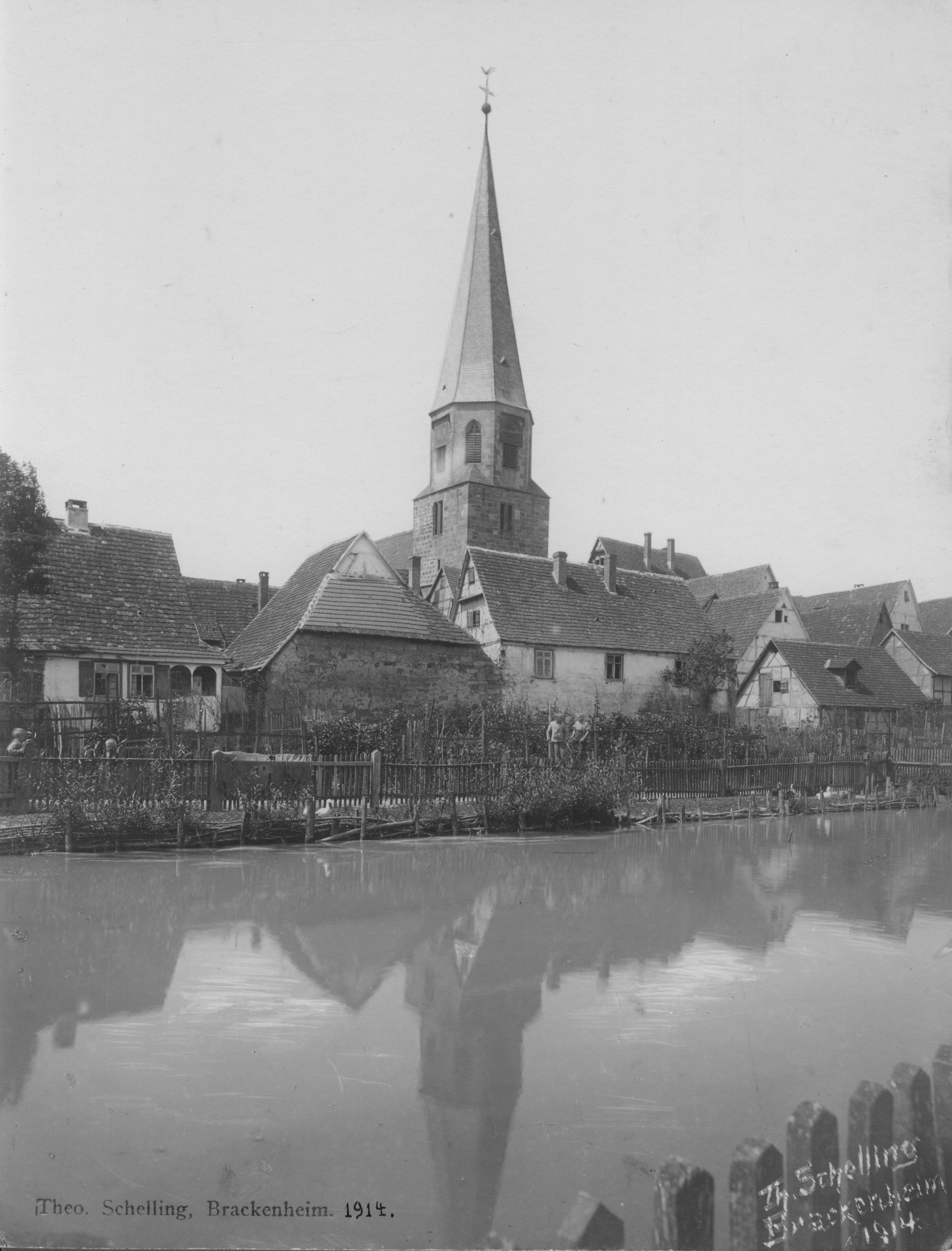 Feuerlöschteich in Brackenheim 1914